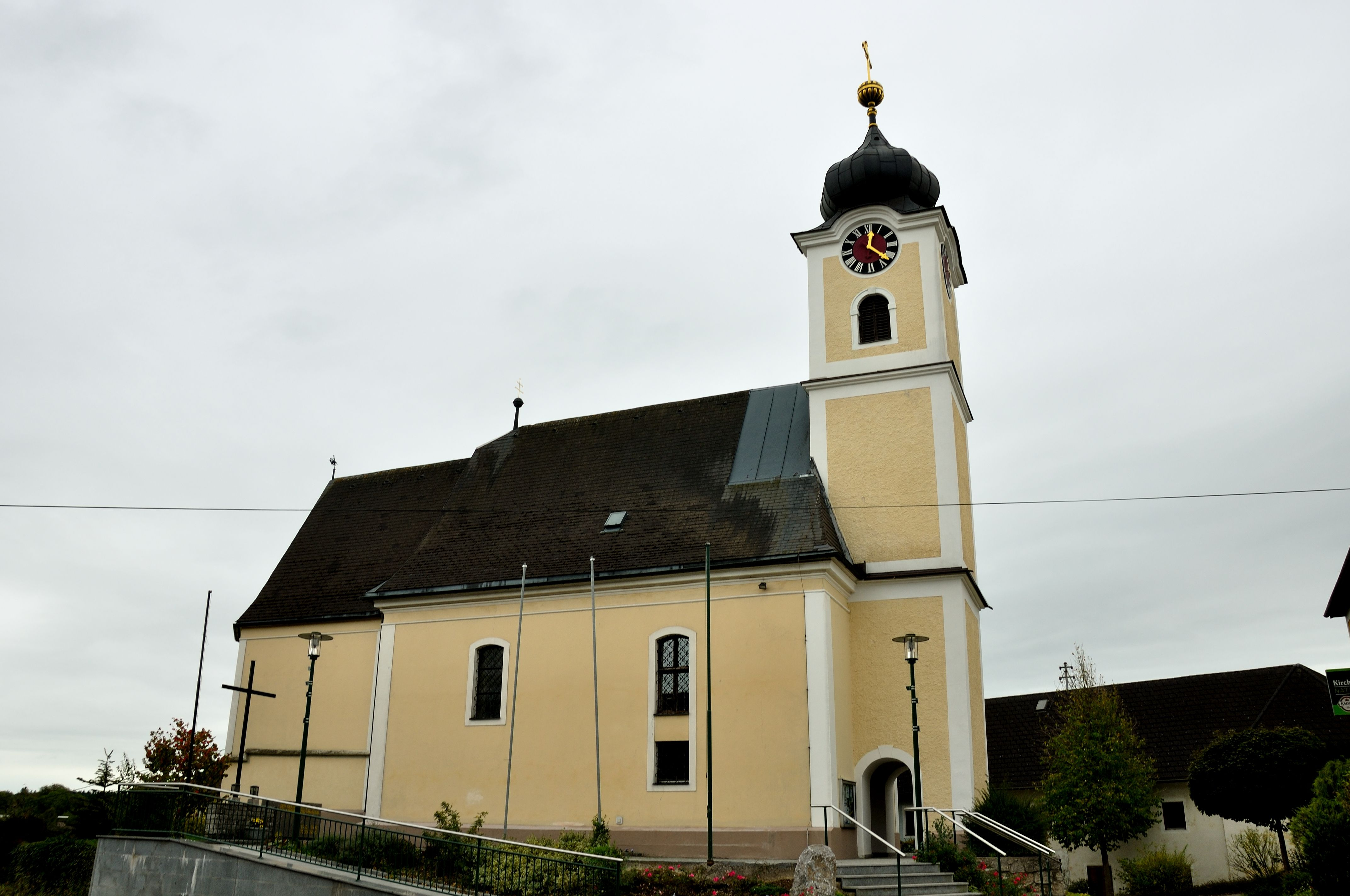 Kath. Pfarrkirche hl. Lorenz und ehem. Friedhof